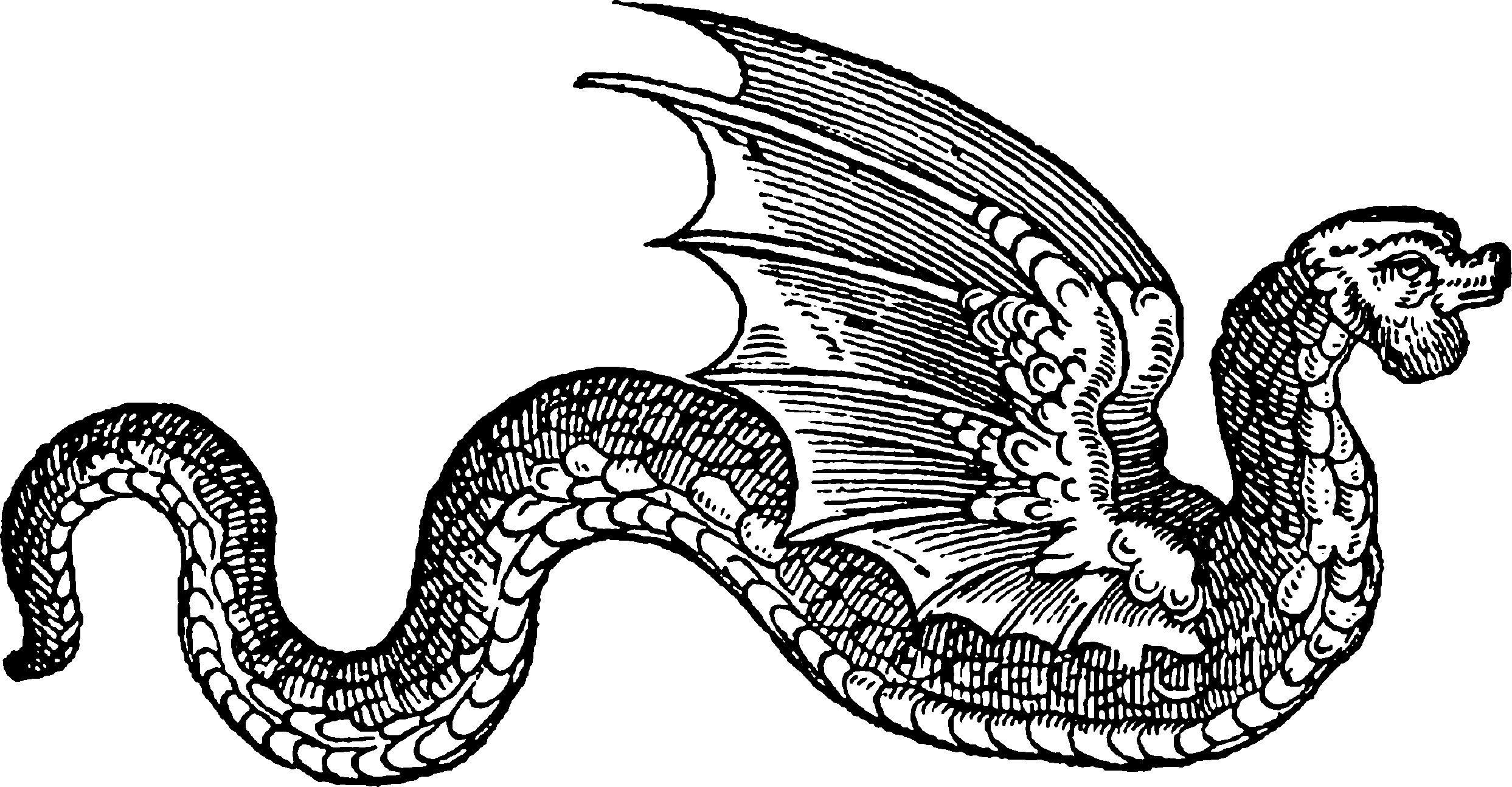 Oude prent van een Amphiptere.